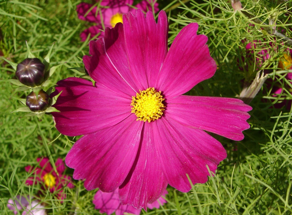 Cosmos bipinnatus - kosmos pierzasty